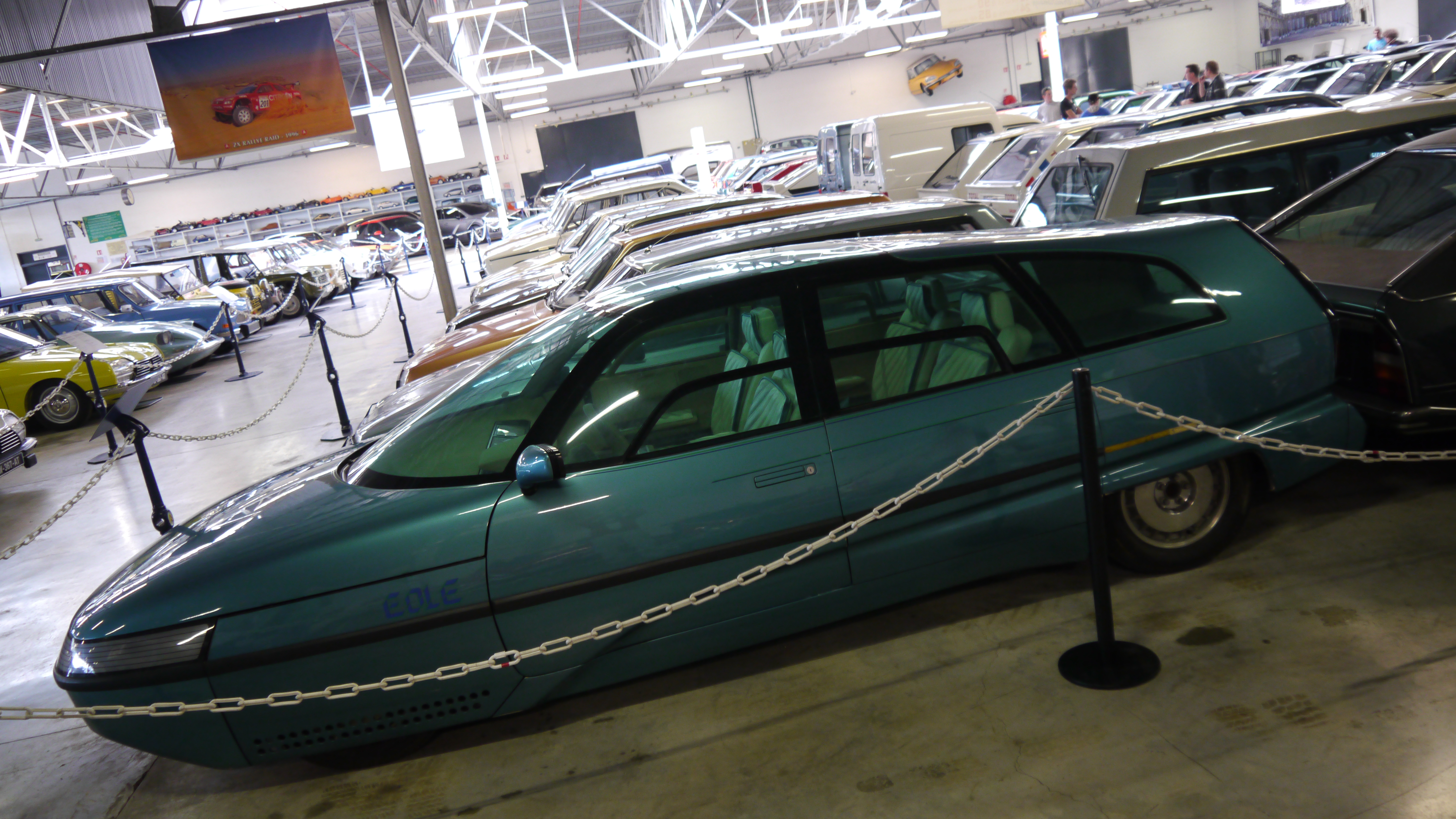 Conservatoire Citroen 133